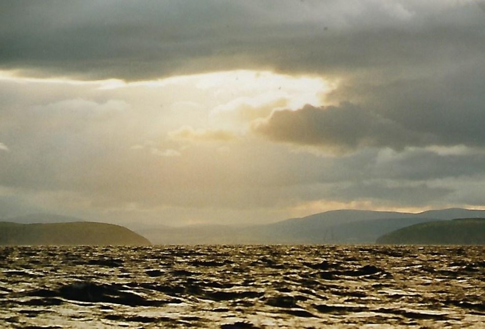 Blick von der Nordsee auf den Ausgang des Moray Firth